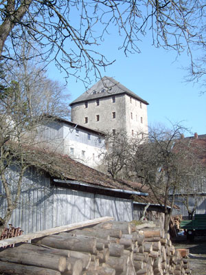 Fressendes Haus